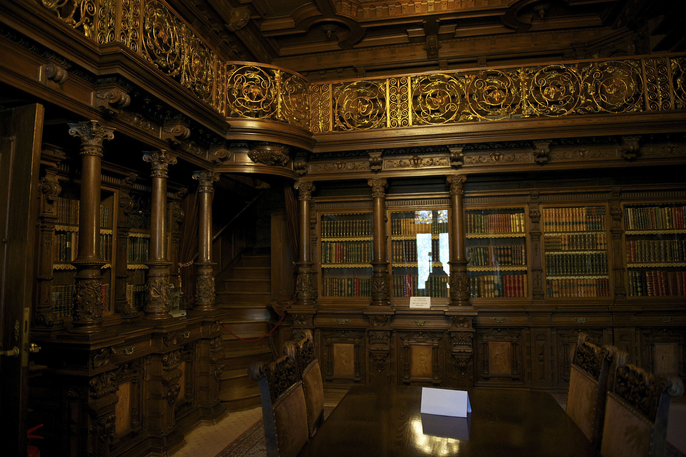 Castelul Peleș 01